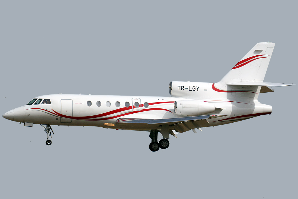 From Gabon Barcelona El Prat (LEBL/BCN) Airport